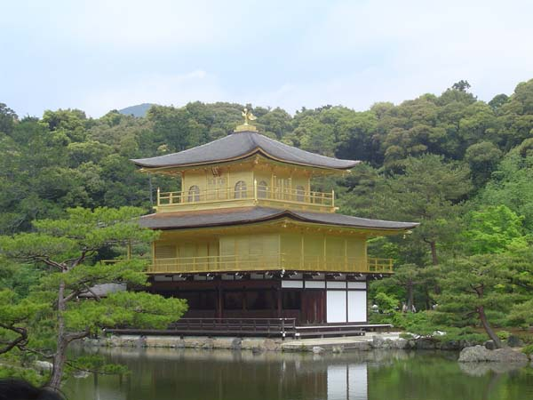 鹿苑寺金閣